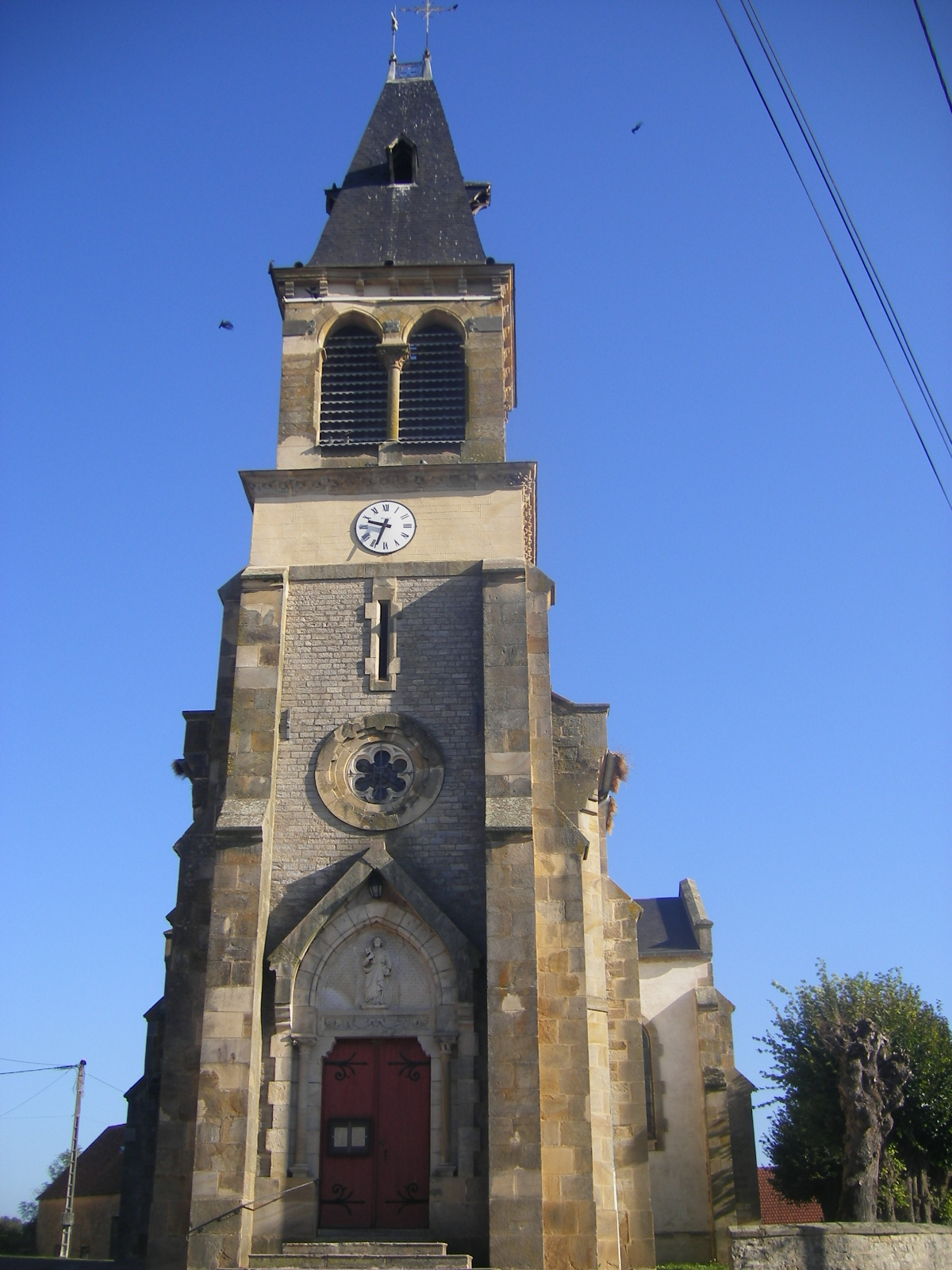 église de Ville-Langy